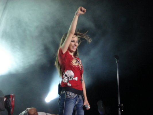 Belinda en el Auditorio Coca Cola en Monterrey Nuevo León, durante su gira Utopía